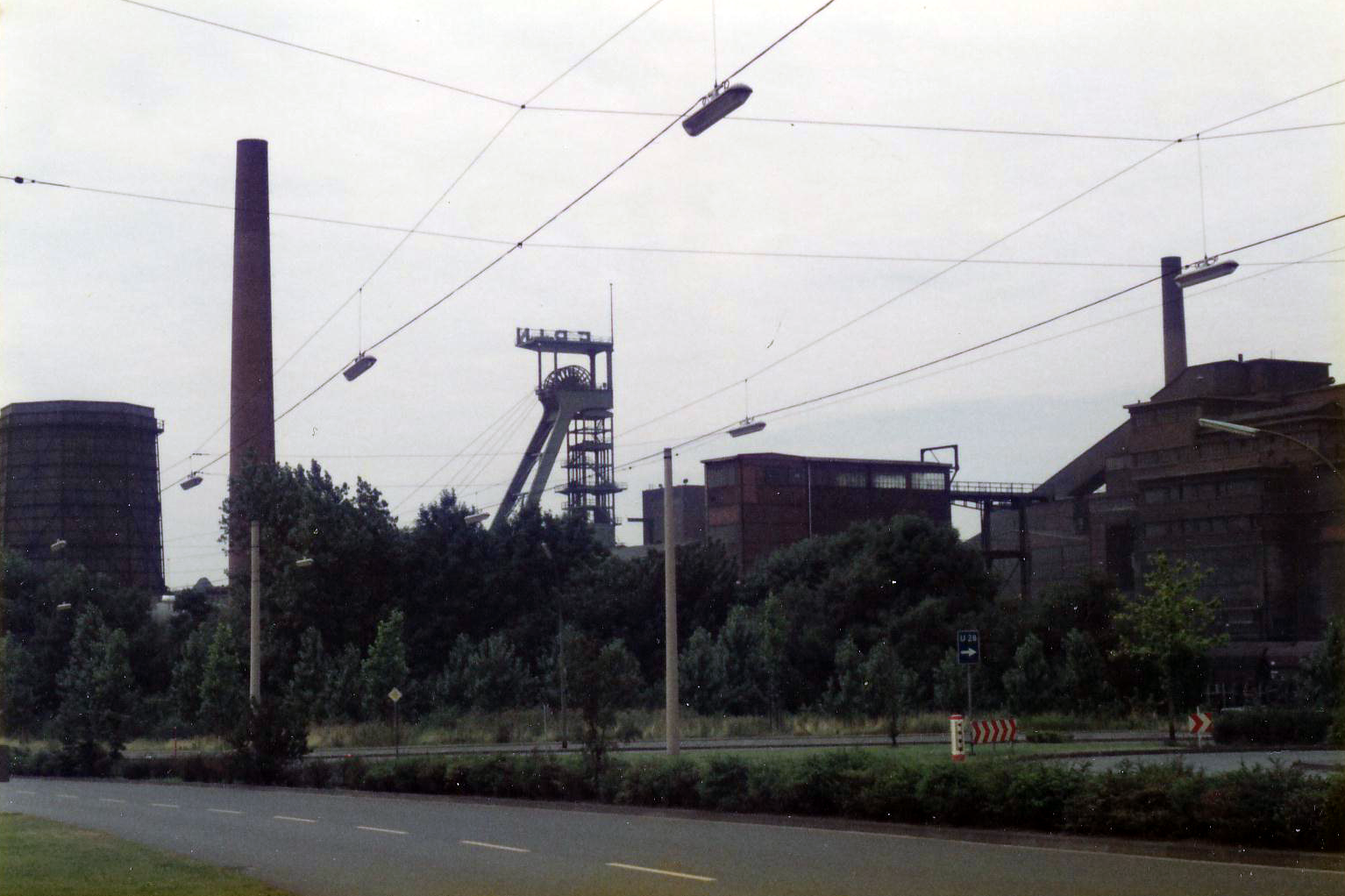 Werksanlage der Zeche Erin vom Altstadtring betrachtet; Castrop-Rauxel